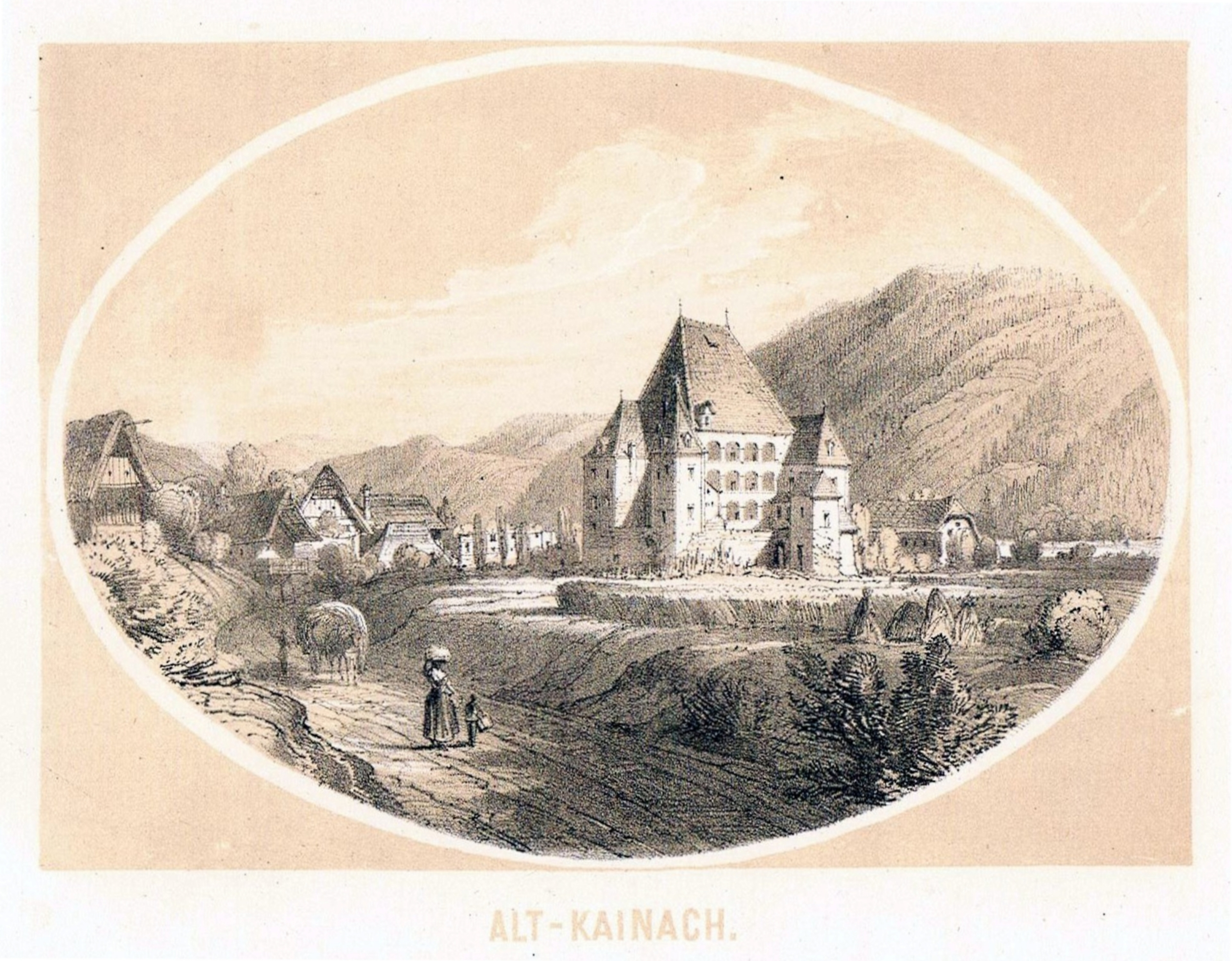 Schloss Alt Kainach nach Karl Reichert 1862/63 in Bärnbach, Voitsberg, Steiermark